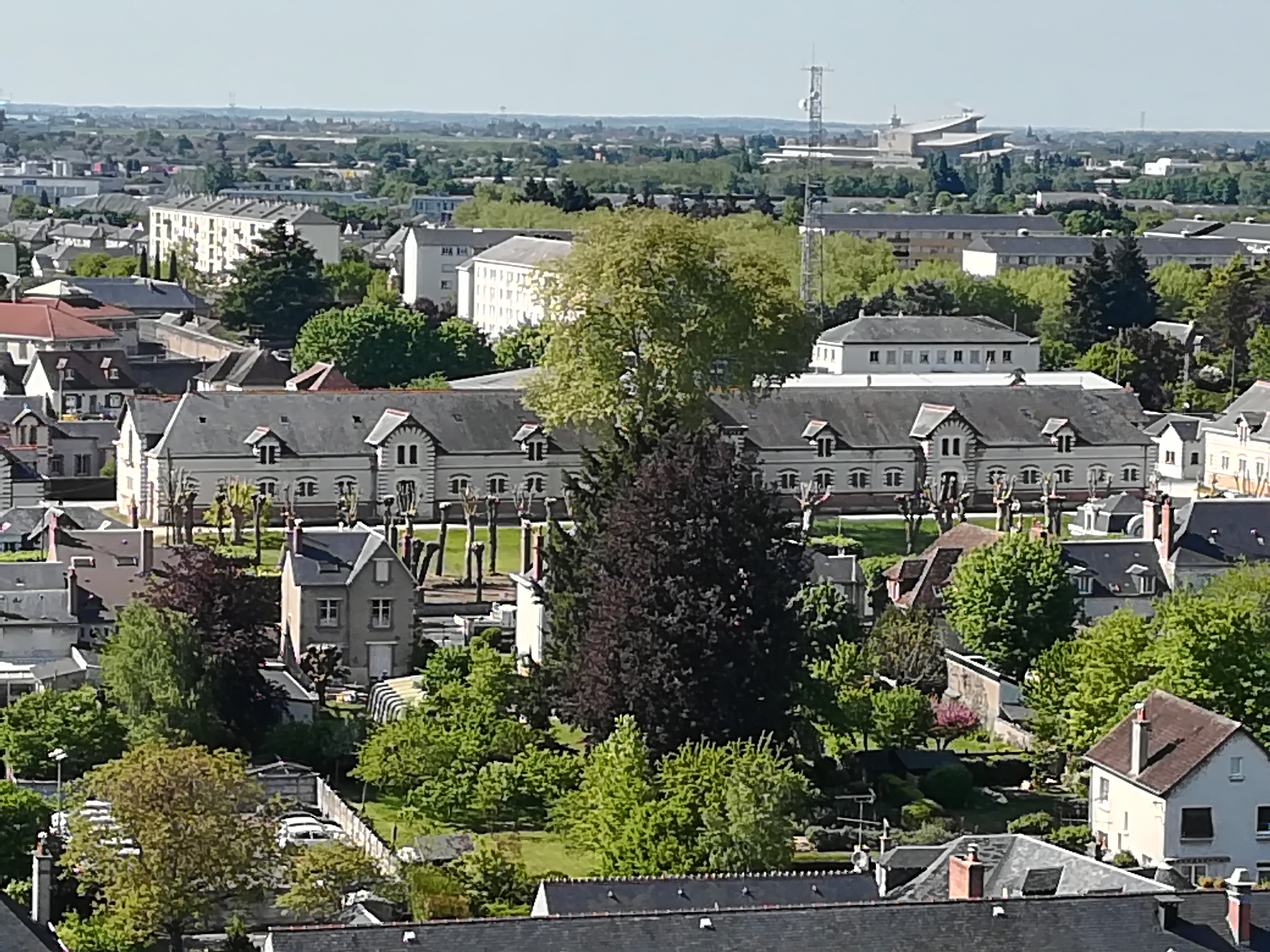 Haras national de Blois vu depuis la basilique